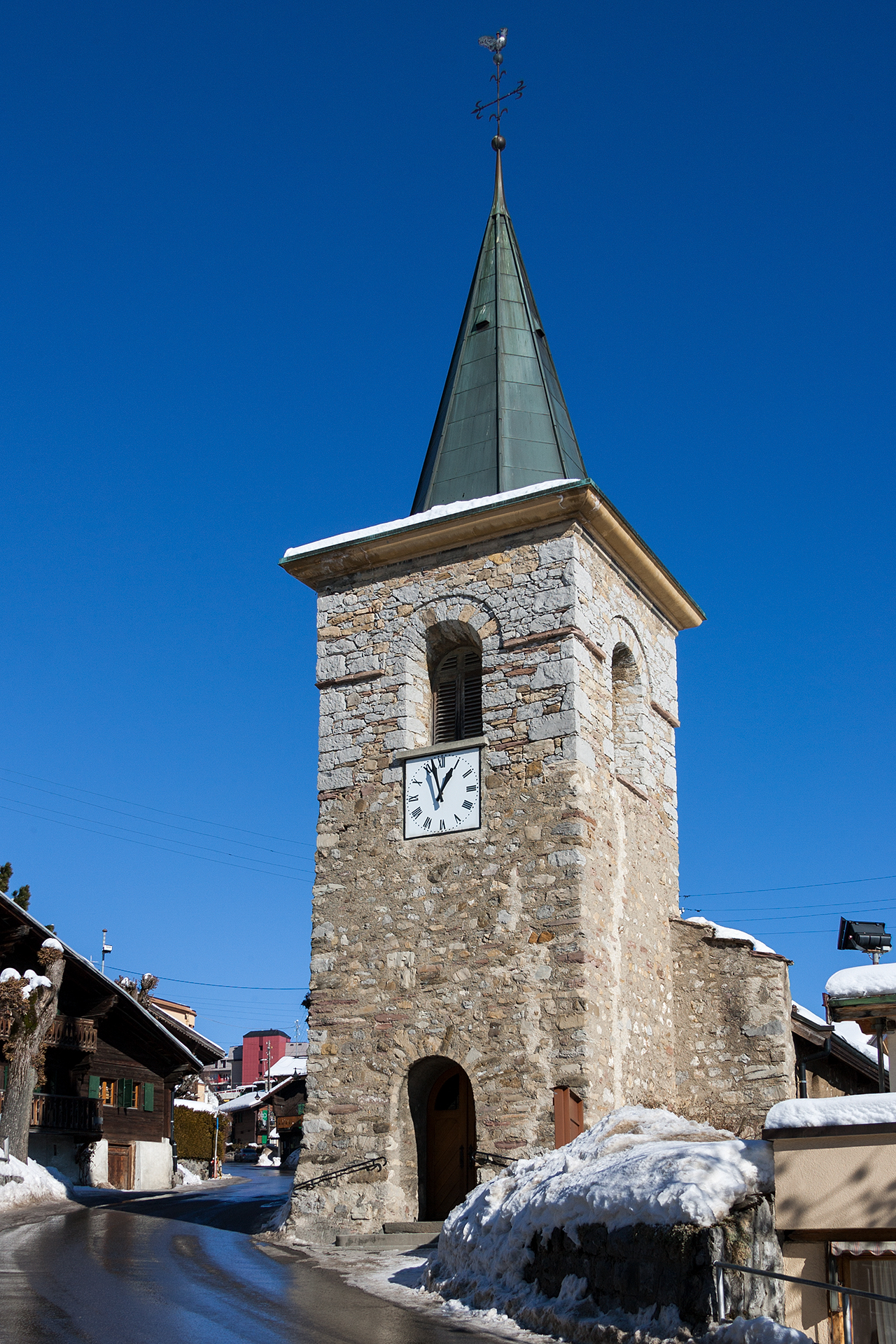 Kirche in Leysin (VD)